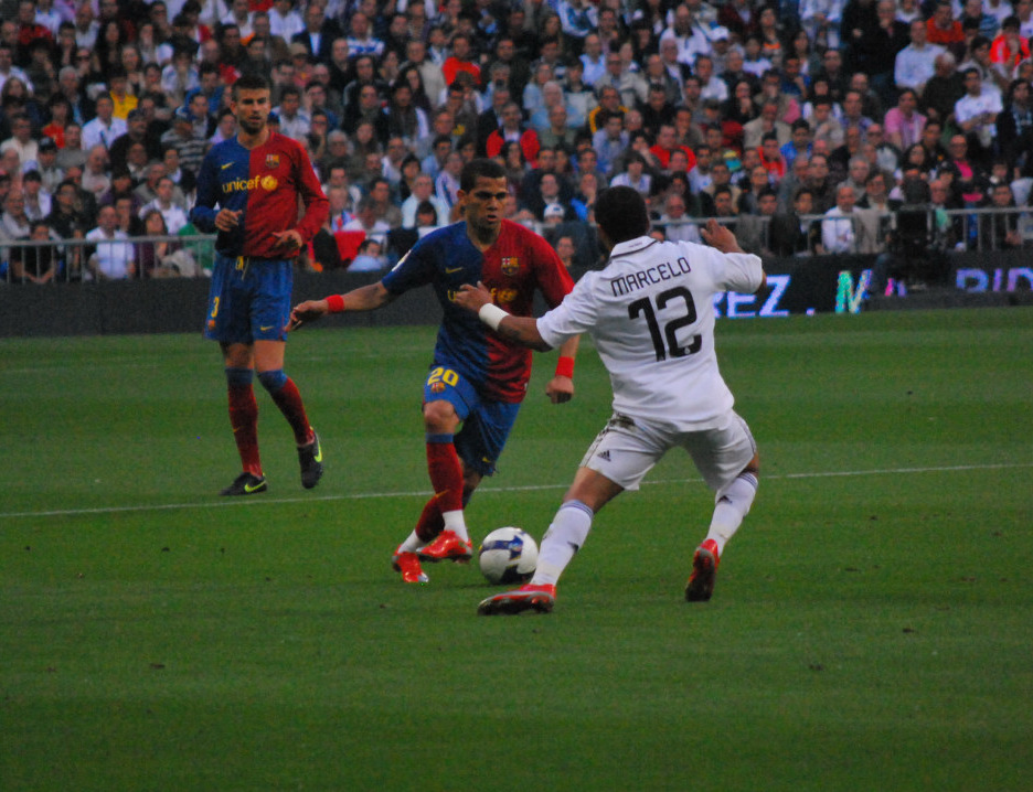 Real Madrid - Barça